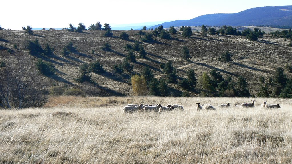 (fr) Landes à callunes (Calluna vulgaris) avec moutons dans le Forez (Rhône-Alpes-Auvergne)